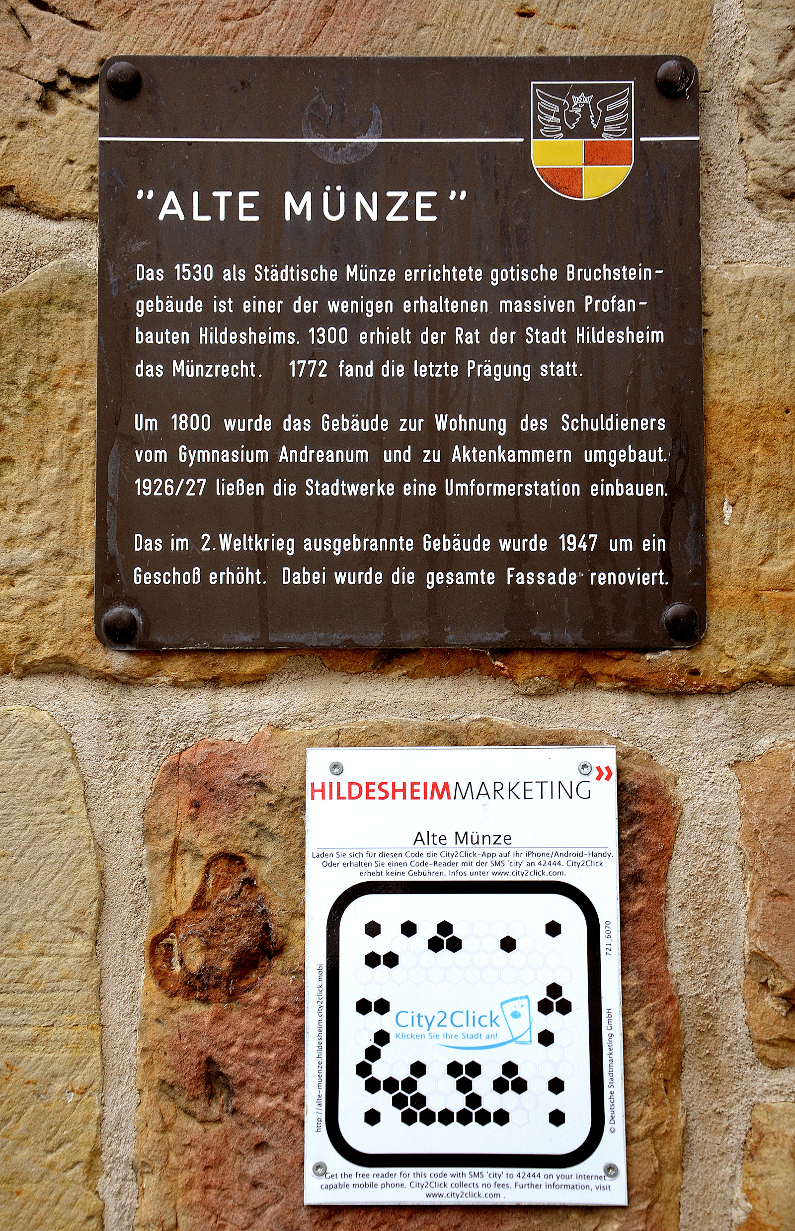 Über einer City2Click"-Tafel am Gebäude der Alten Münze in Hildesheim findet sich auf einer gesonderten Legenden-Tafel der Text „"Alte Münze" Das 1530 als Städtische Münze errichtete gotische Bruchsteingebäude ist einer der wenigen erhaltenen massiven Profanbauten Hildesheims. 1300 erhielt der Rat der Stadt Hildesheim das Münzrecht. 1772 fand die erste Prägung statt. Um 1800 wurde das Gebäude zur Wohnung des Schuldieners vom Gymnasium Andreanum und zu Aktenkammern umgebaut. 1926/27 ließen die Stadtwerke eine Umformerstation einbauen. Das im Zweiten Weltkrieg ausgebrannte Gebäude wurde 1947 um ein Geschoss erhöht. Dabei wurde die gesammte Fassade renoviert.“ ...